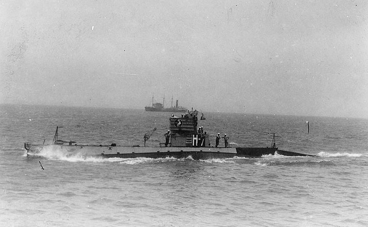 NH-53610 USS H-7 underway, circa 1922